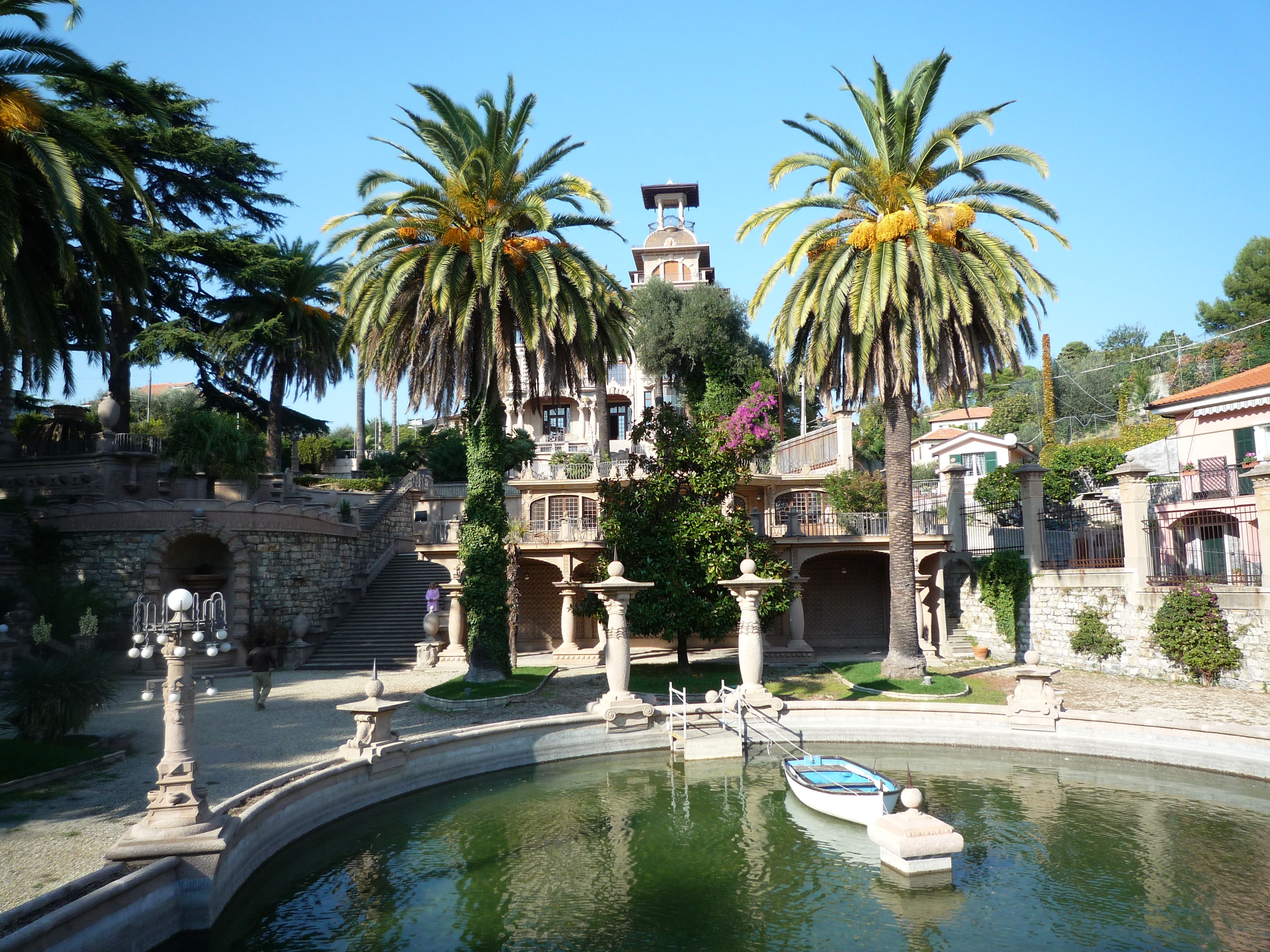 Blick vom Garten auf die Villa Grock